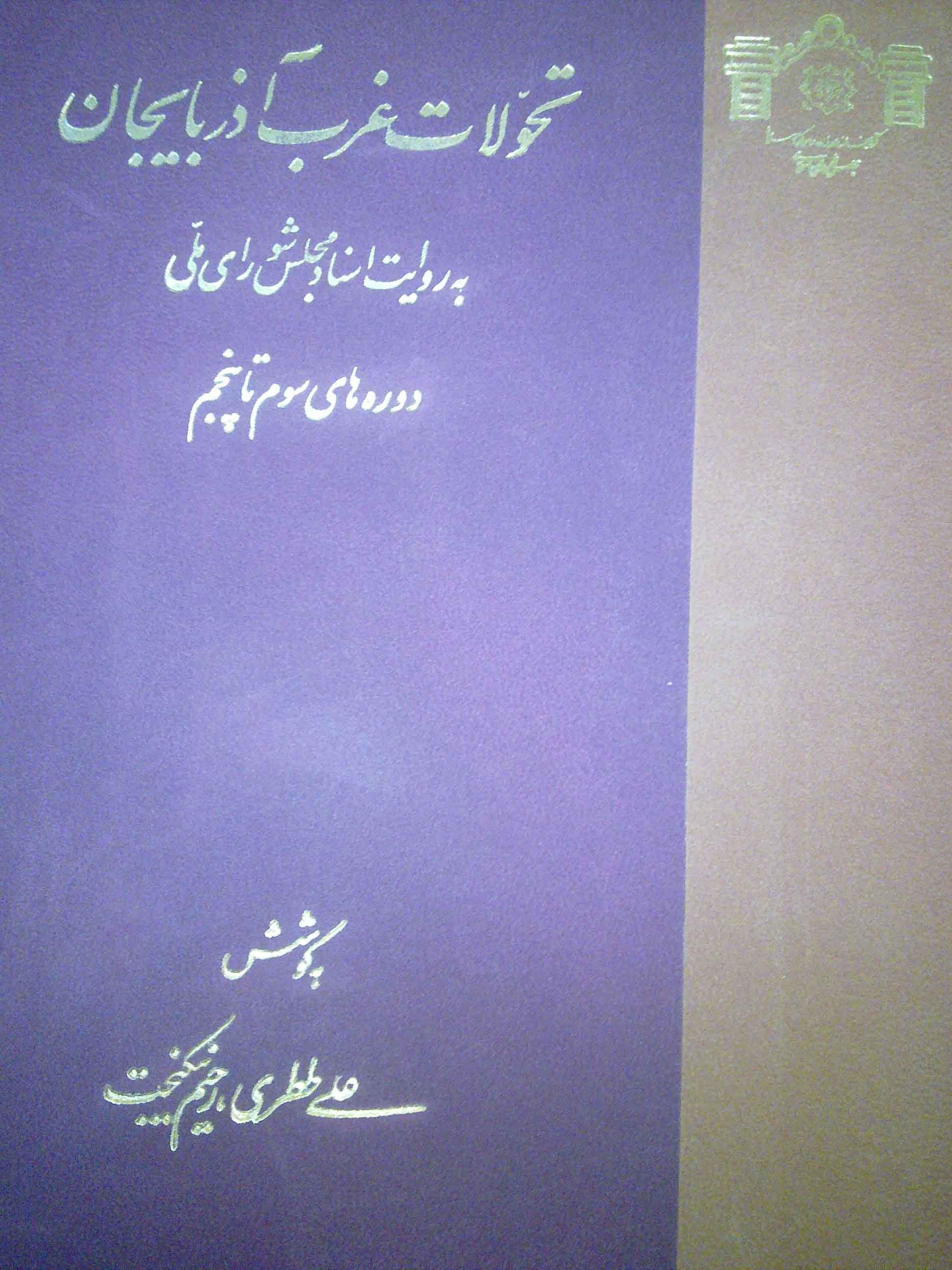 تحولات غرب آذربایجان